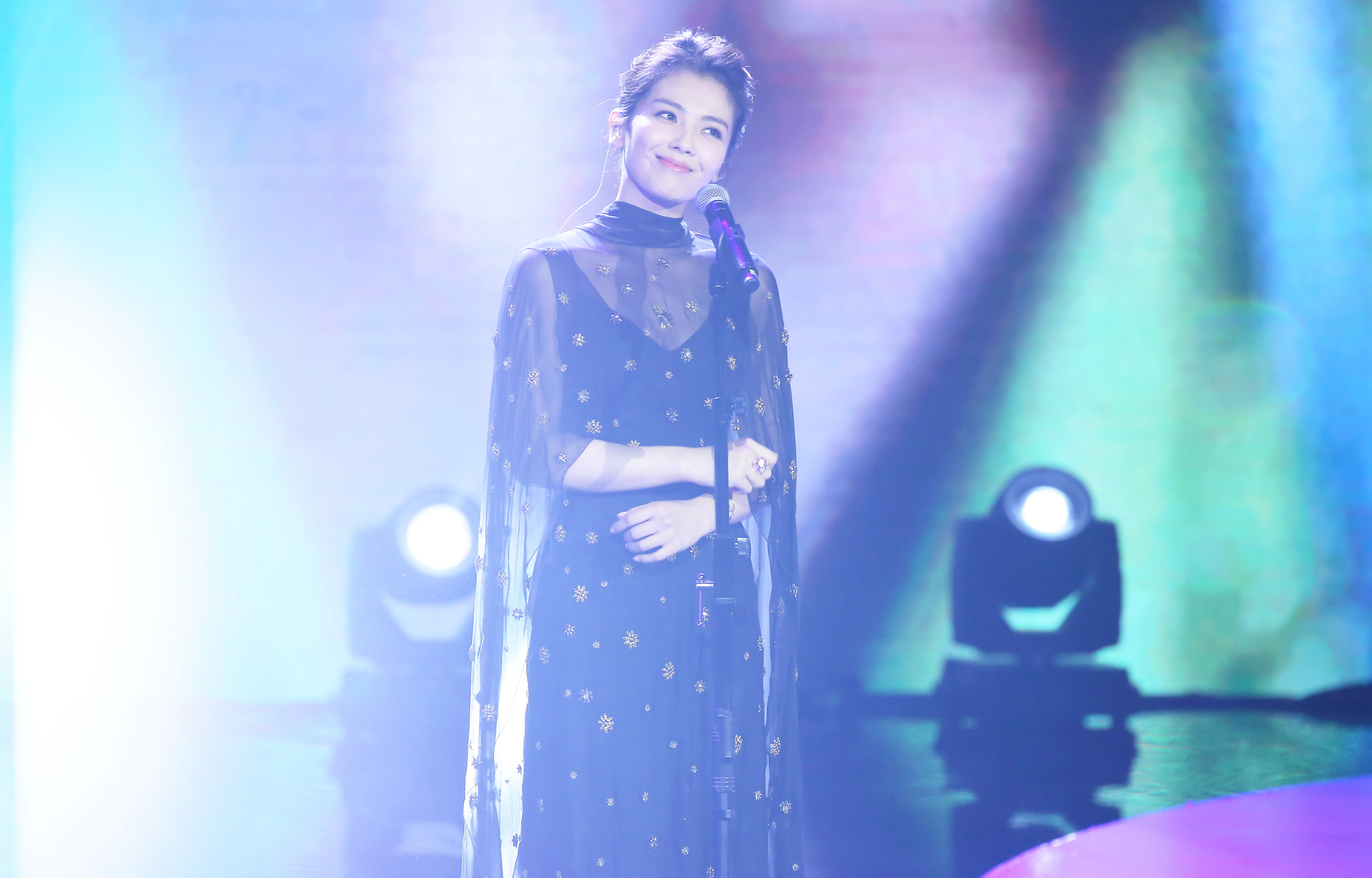 上海 微博电影之夜 刘涛